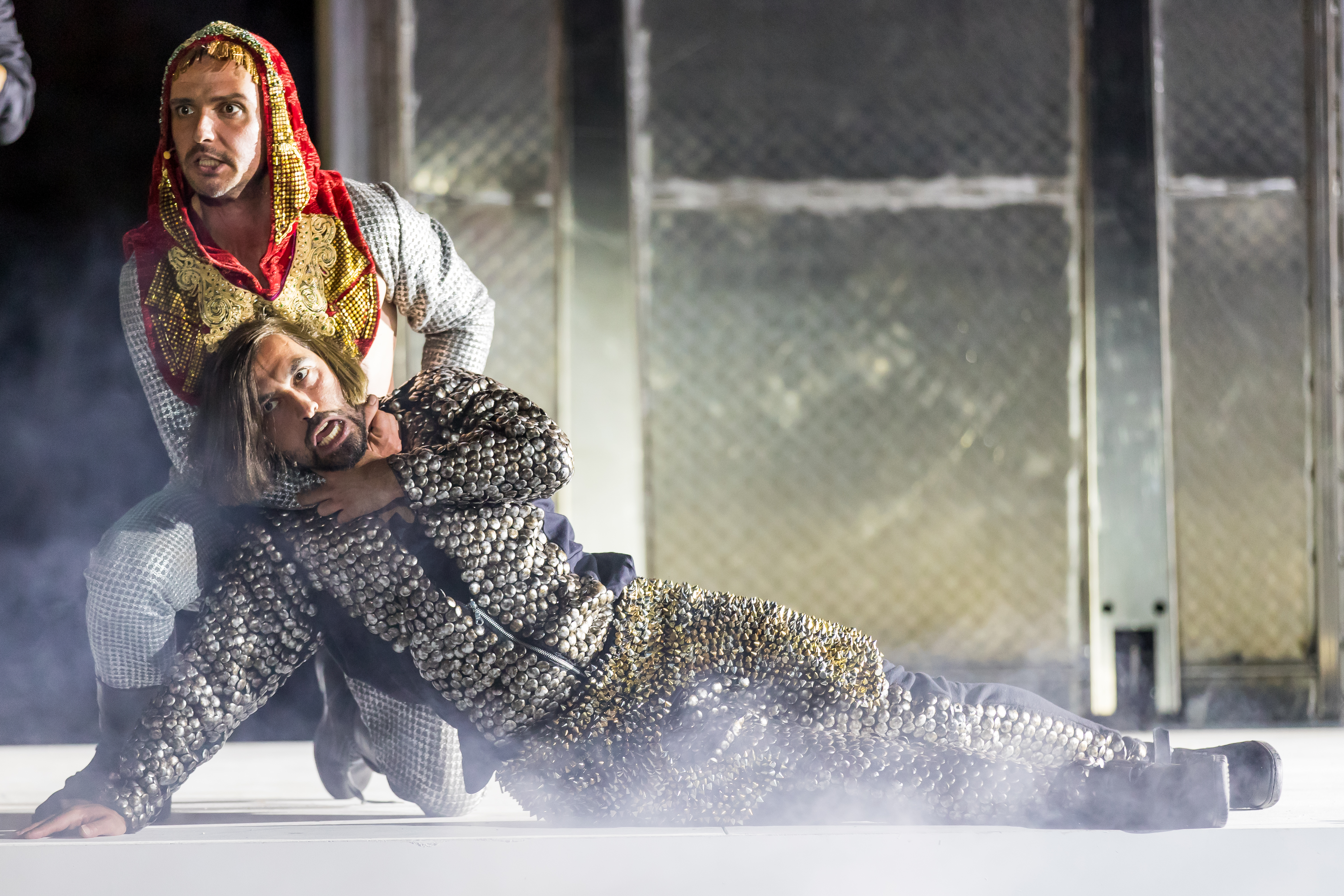 2016: Uraufführung: "GOLD. Der Film der Nibelungen" Regie: Nuran David Calis Autor: Albert Ostermaier Intendant: Nico Hofmann --- Ensemble: Produzent Konstantin Trauer: Uwe Ochsenknecht Regisseur Arsenij Kubik: Vladimir Burlakov Drehbuchautor Charlie P. Weide: Josef Ostendorf Society Reporter Peter Scheumer: Dominic Raacke Kamerafrau "the eye": Anna Rot Setdesignerin "set": Joy Maria Bai Assistentin des Produzenten Carmen: Alexandra Kamp Maskenbildnerin Sueyla Blume : Ayse Bosse die Ältere Kriemhild Karina Bergmann: Katja Weitzenböck die Jüngere Kriemhild Simone Gehel: Constanze Wächter die Ältere Brünhild Lotte Jünger: Michaela Steiger die Jüngere Brünhild Nathalie Aurun: Dennenesch Zoudé Siegfried Mohamad Söder: Ismail Deniz Hagen René Inner: Sascha Göpel Gunther Klaus Castel: Maximilian Laprell Bürgermeister Franz Koppoler: Heiner Lauterbach during Nibelungenfestspiele "GOLD. Der Film der Nibelungen" at Wormser Kaiserdom, Worms, Rheinland Pfalz, Germany on 2016-07-12, Photo: Sven Mandel